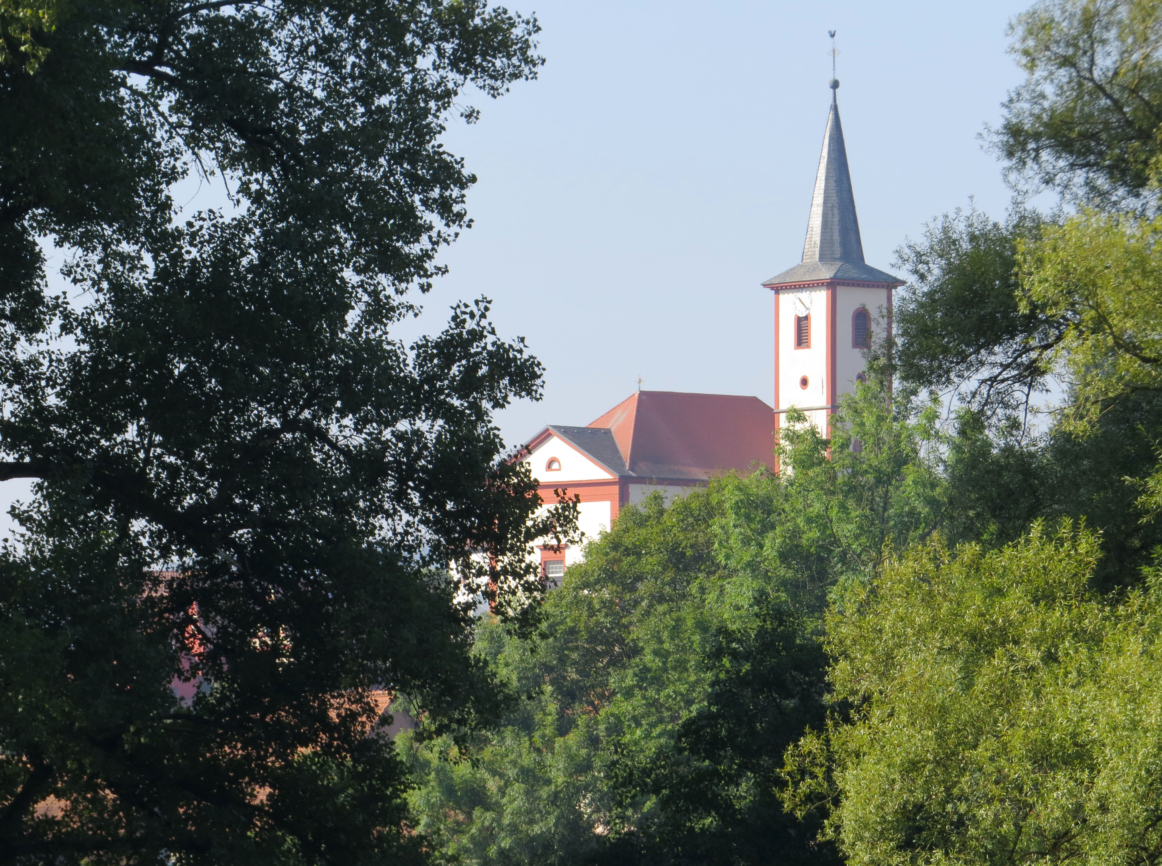 Kirche St. Jakobus der Ältere in Hafenlohr